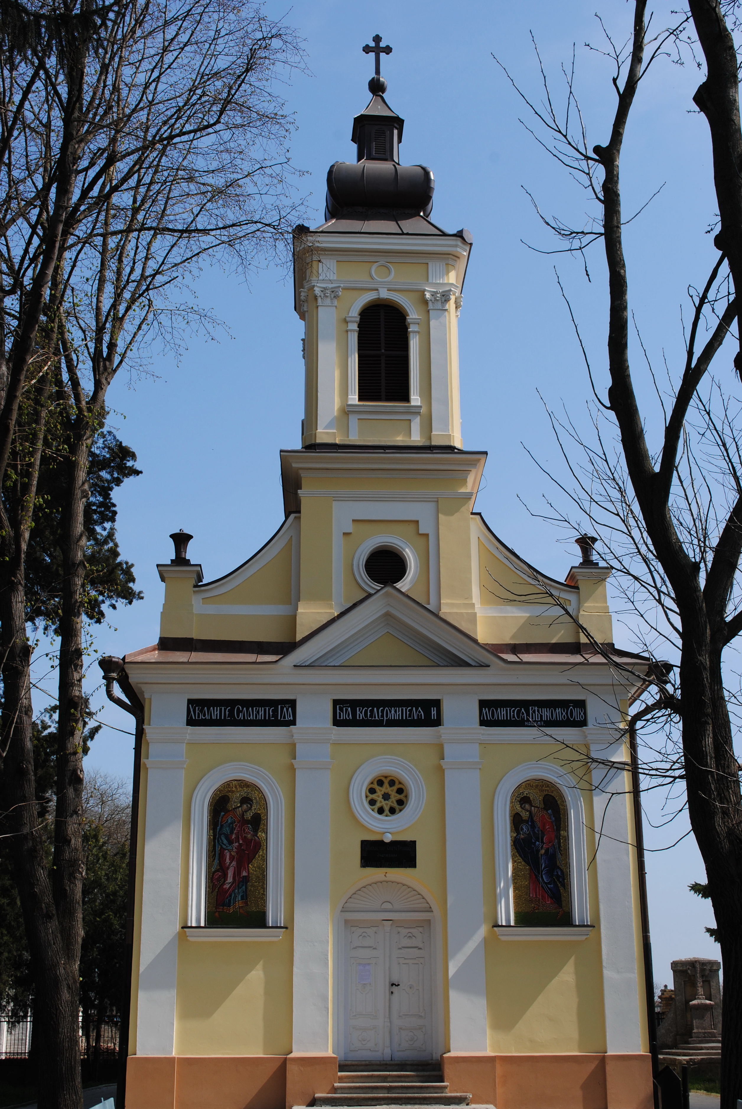 Srpski (latinica): Manastir Svete Trojice